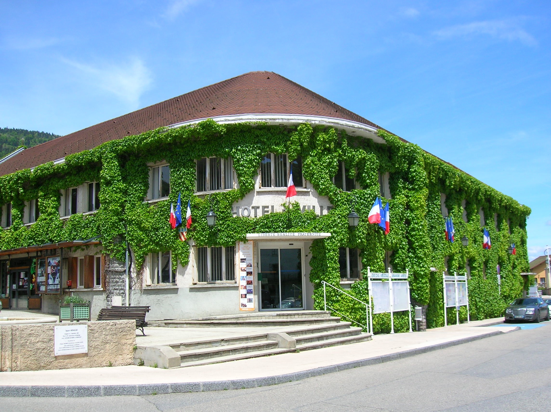 mairie à Allevard, Isère, France.